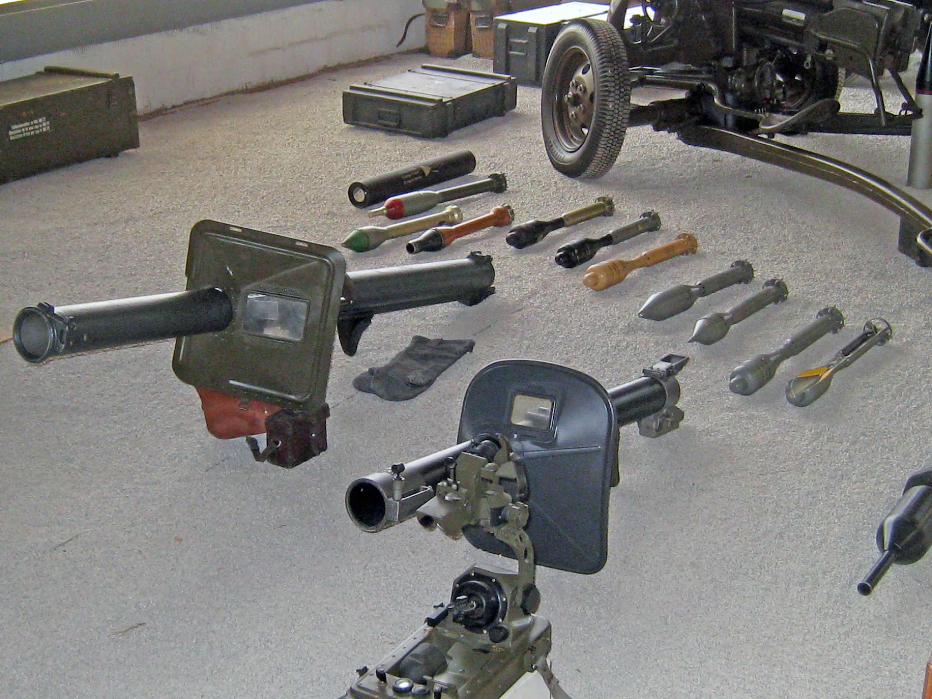 Raketenrohre im Militärmuseum Full